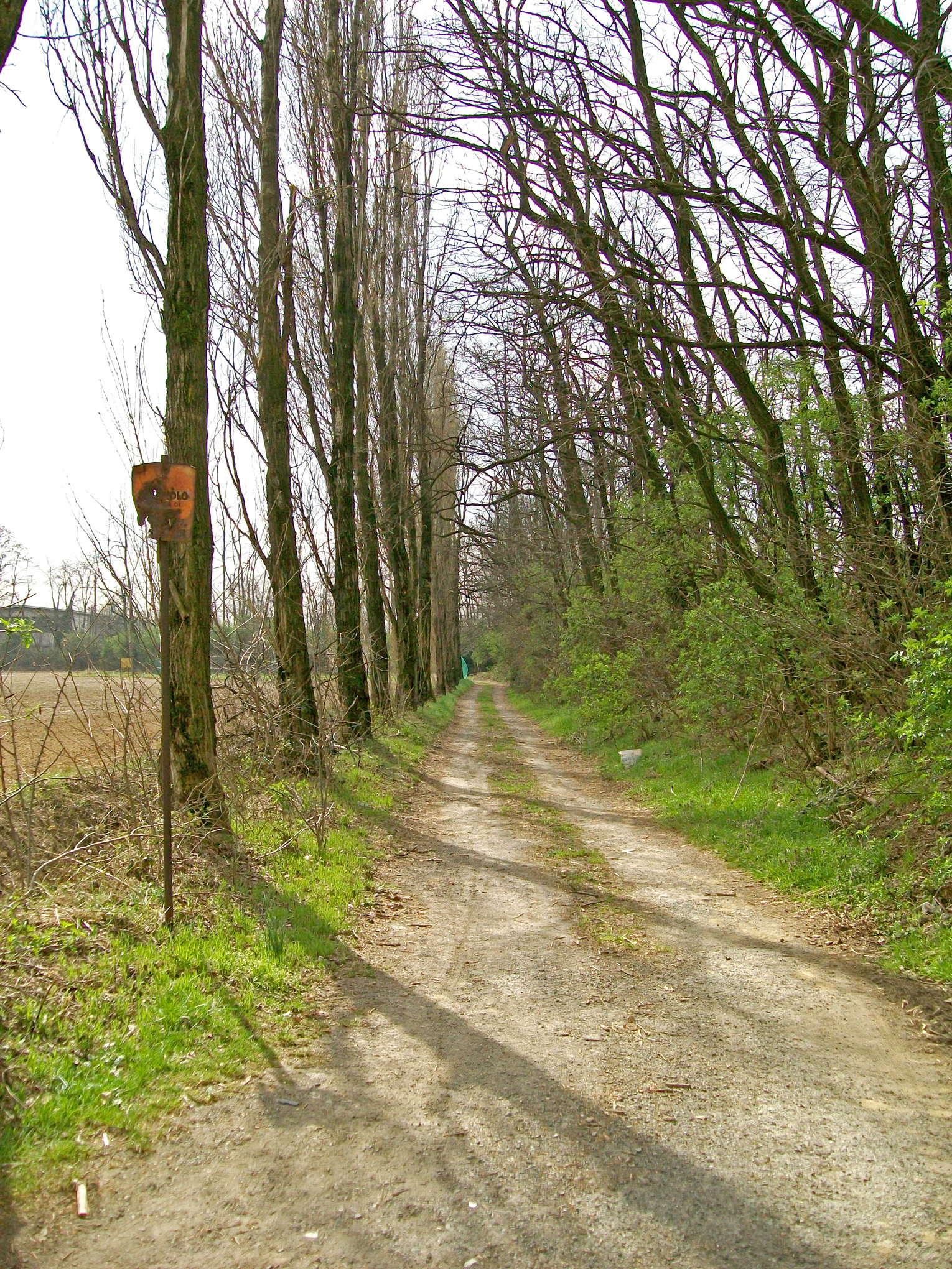 Campi e viottoli di campagna ad Arese